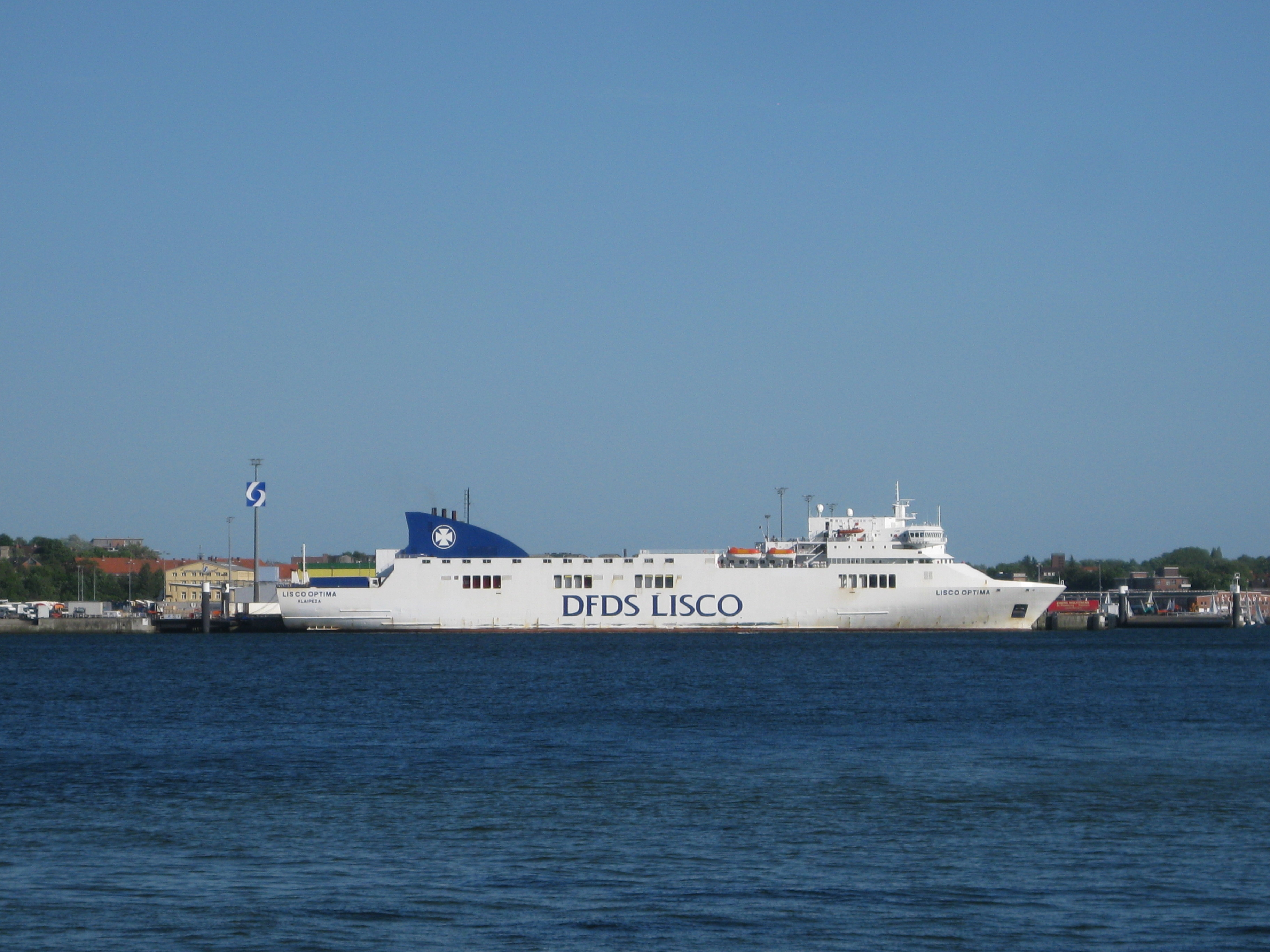 LISCO Optima am Liegeplatz in Kiel, Ostuferhafen